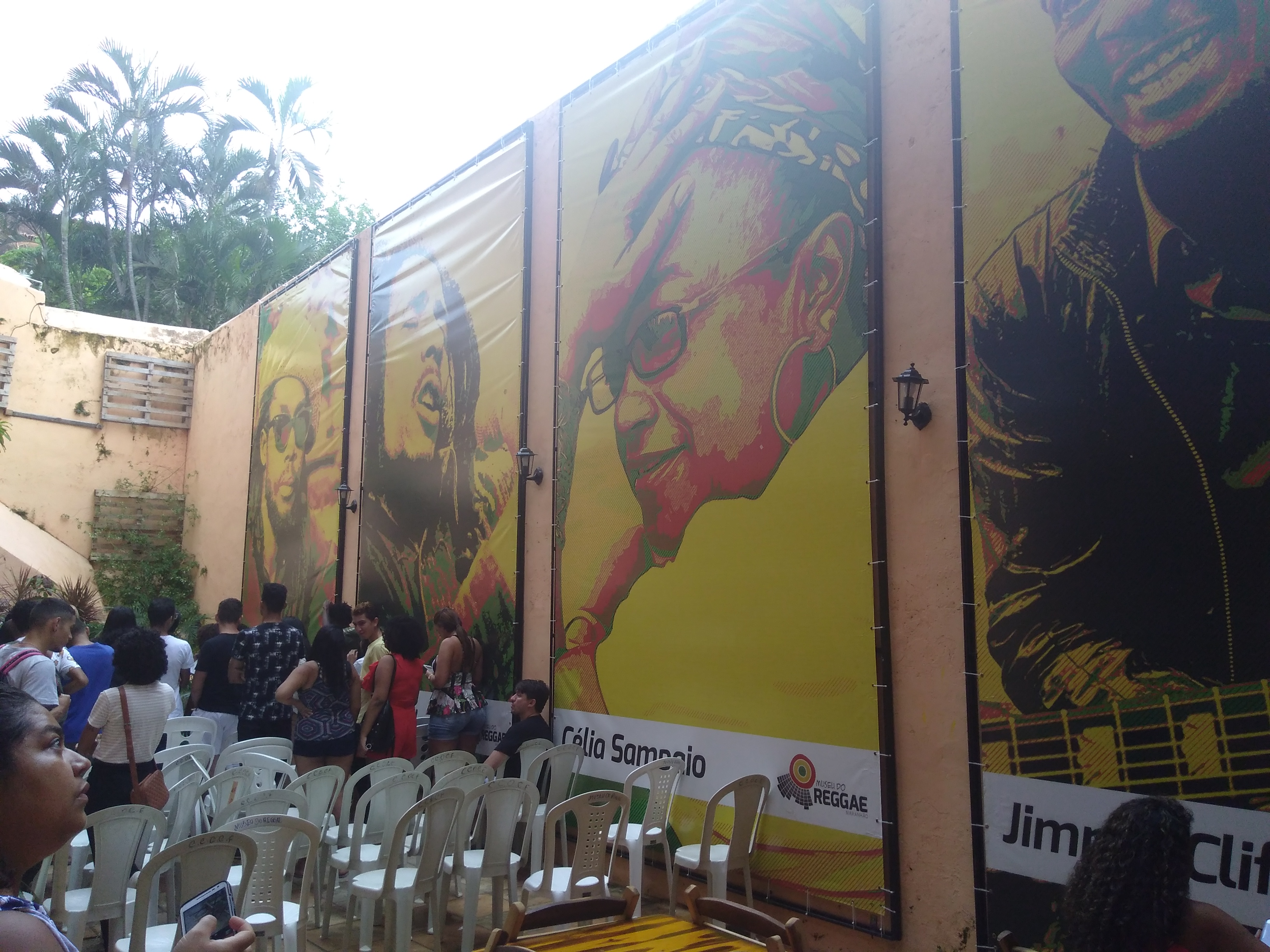 Área externa e acervo do Museu do Reggae do Maranhão, espaço de preservação musical único no país acerca deste gênero musical, o primeiro fora da Jamaica